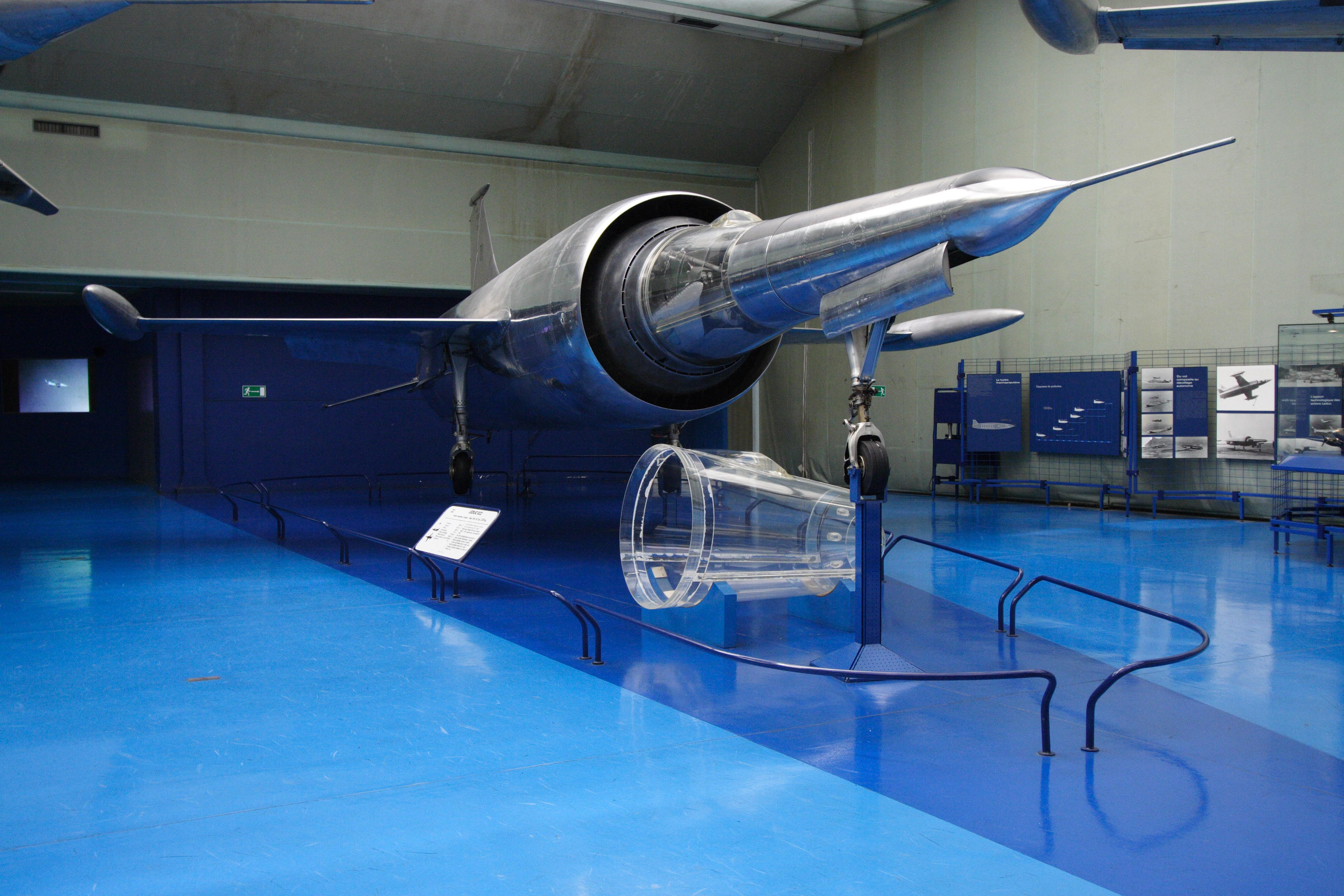 French experimental aircraft Leduc 022 (Musée de l'air et de l'espace, Le Bourget, France)